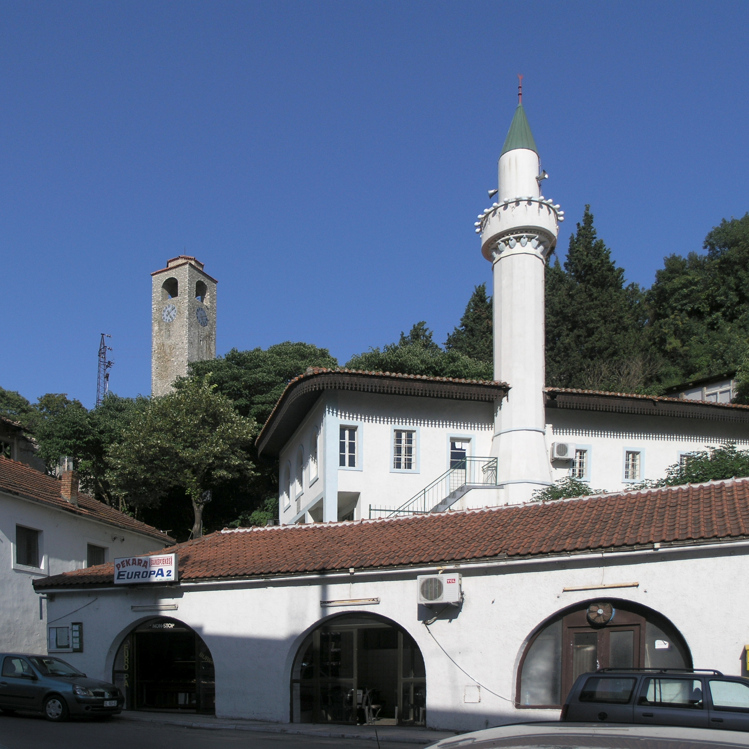 Černá Hora, Ulcinj